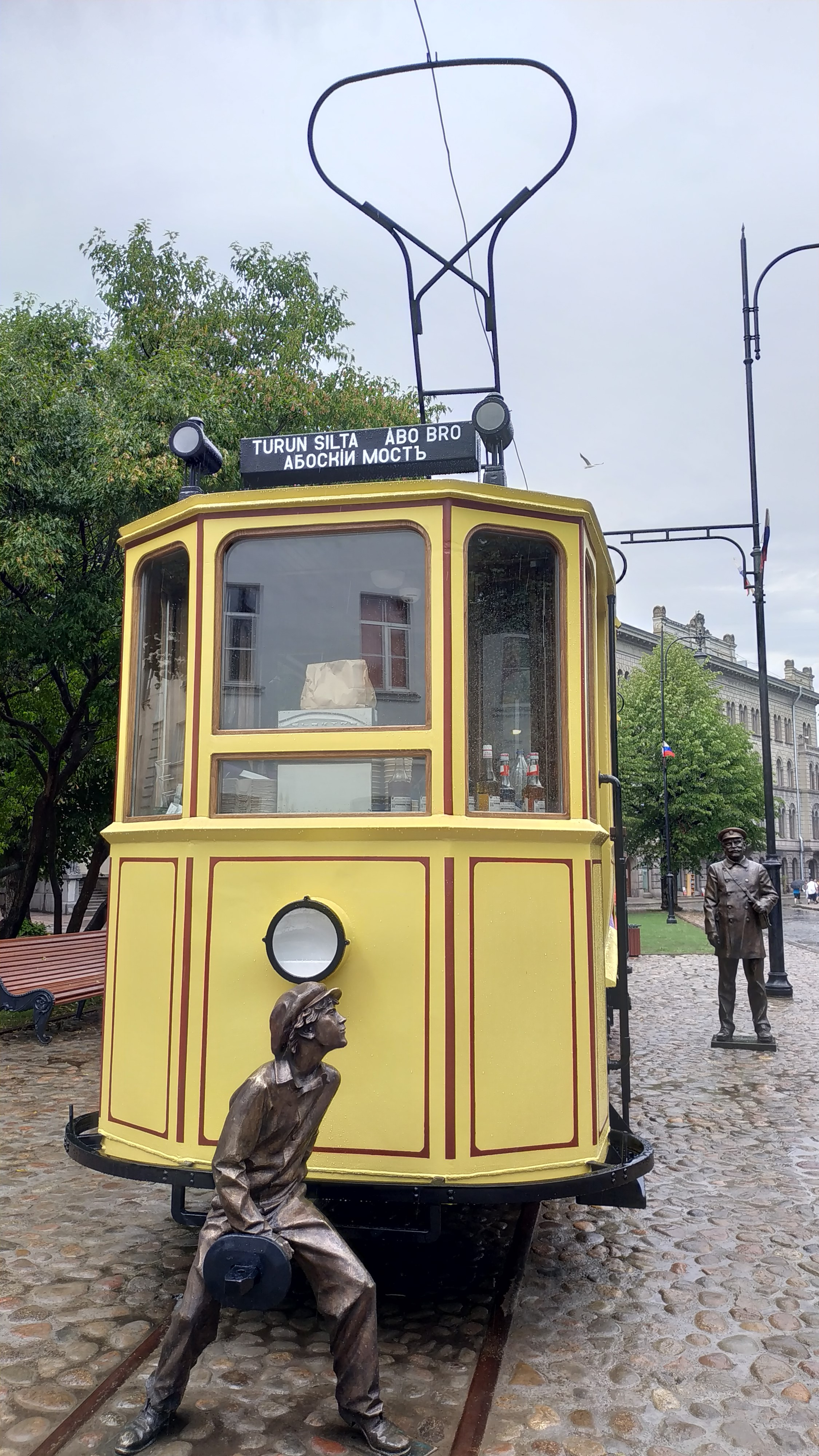 На пересечении Крепостной и Пионерской улиц в 1912 году впервые на рельсы встал трамвай, который ходил по Выборгу до 1957 года. Памятник представляет из себя макет той самой модели, что и работала в Выборге более века назад.